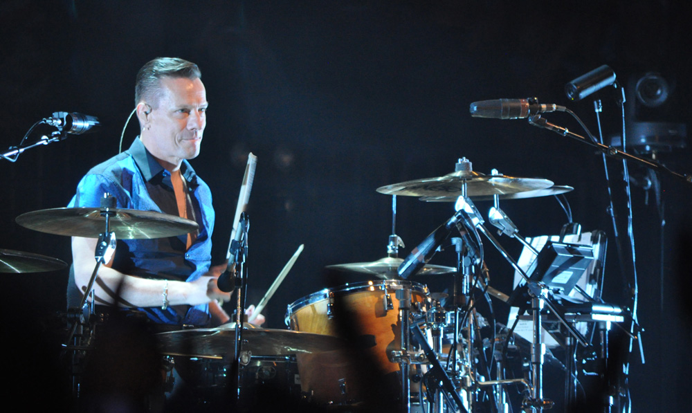 Larry Mullen jr. 2015